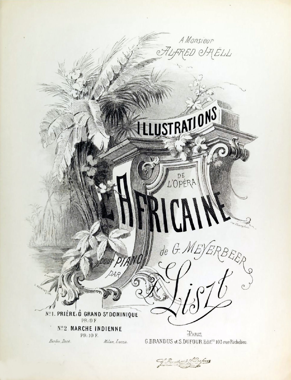 Partition des Illustrations de l'opéra "L'Africaine" de Franz Liszt, sur des thèmes de Meyerbeer